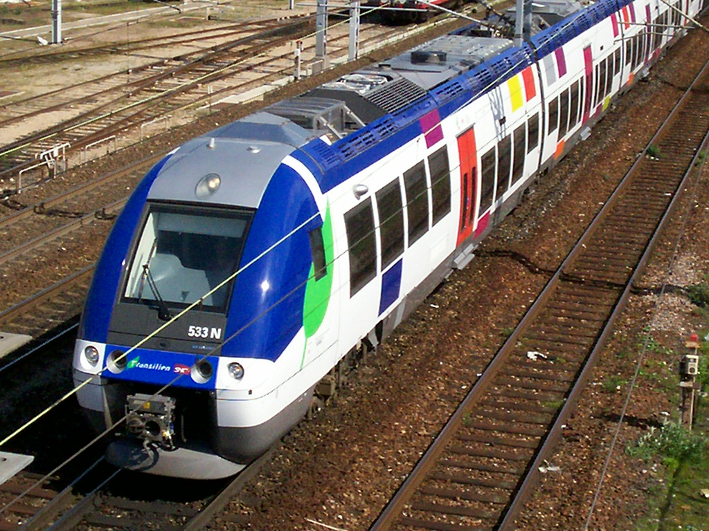 Vue aérienne d'une B 82500 à Paris, vue du pont de la rue Riquet